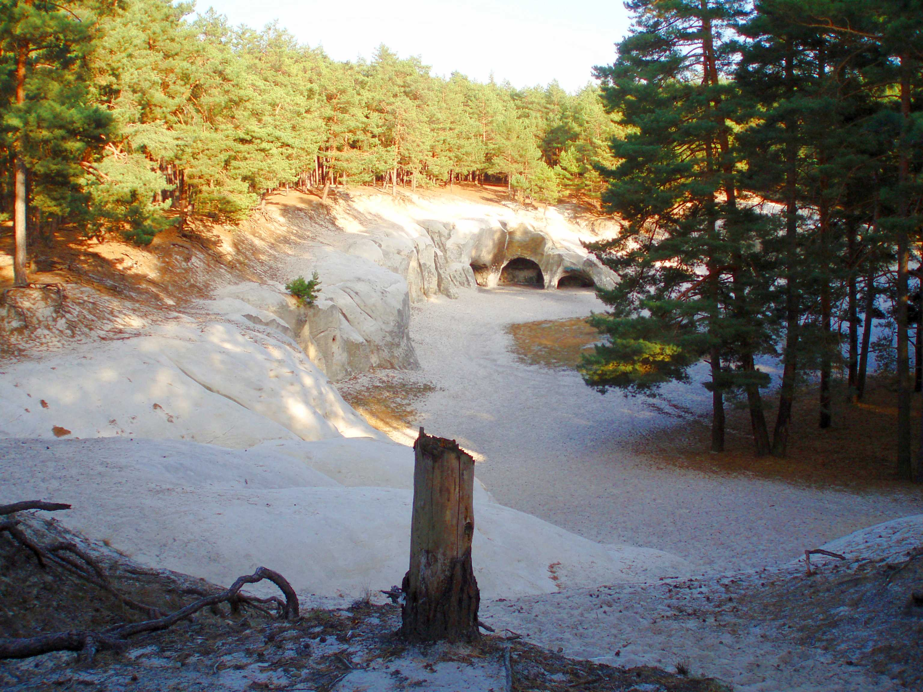 Sandhöhle im Heers bei Blankenburg (Harz)